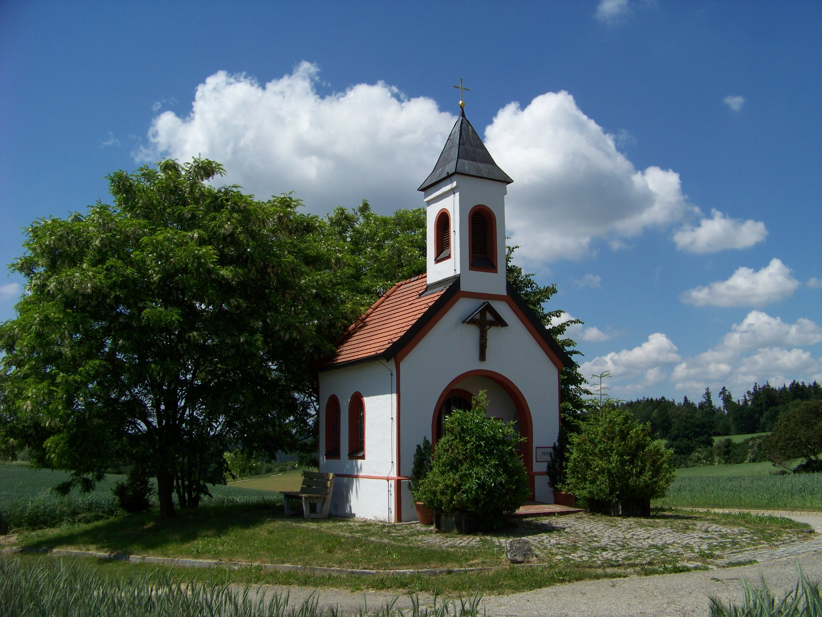 Altdorf, Nähe Gstaudach 2. Marienkapelle. Bau einer Kapelle im Jahre 1991 durch Handwerkerklassen der Berufsschule Landshut. Giebelständiger Bau mit quadratischem Dachreiter über dem rundbogigen Eingang.